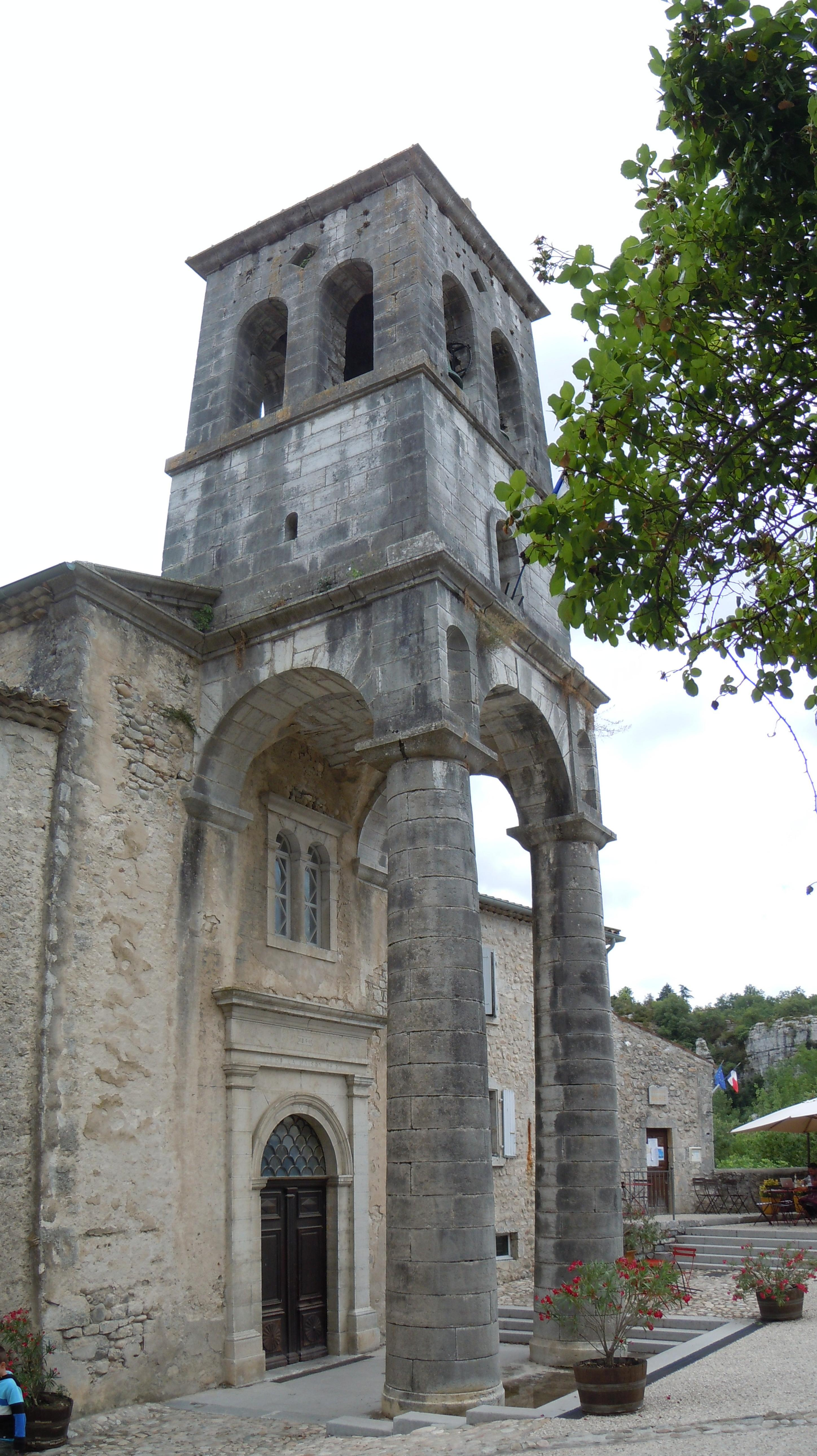 Église Saint-Pierre-aux-liens de Labeaume - Ardèche - France